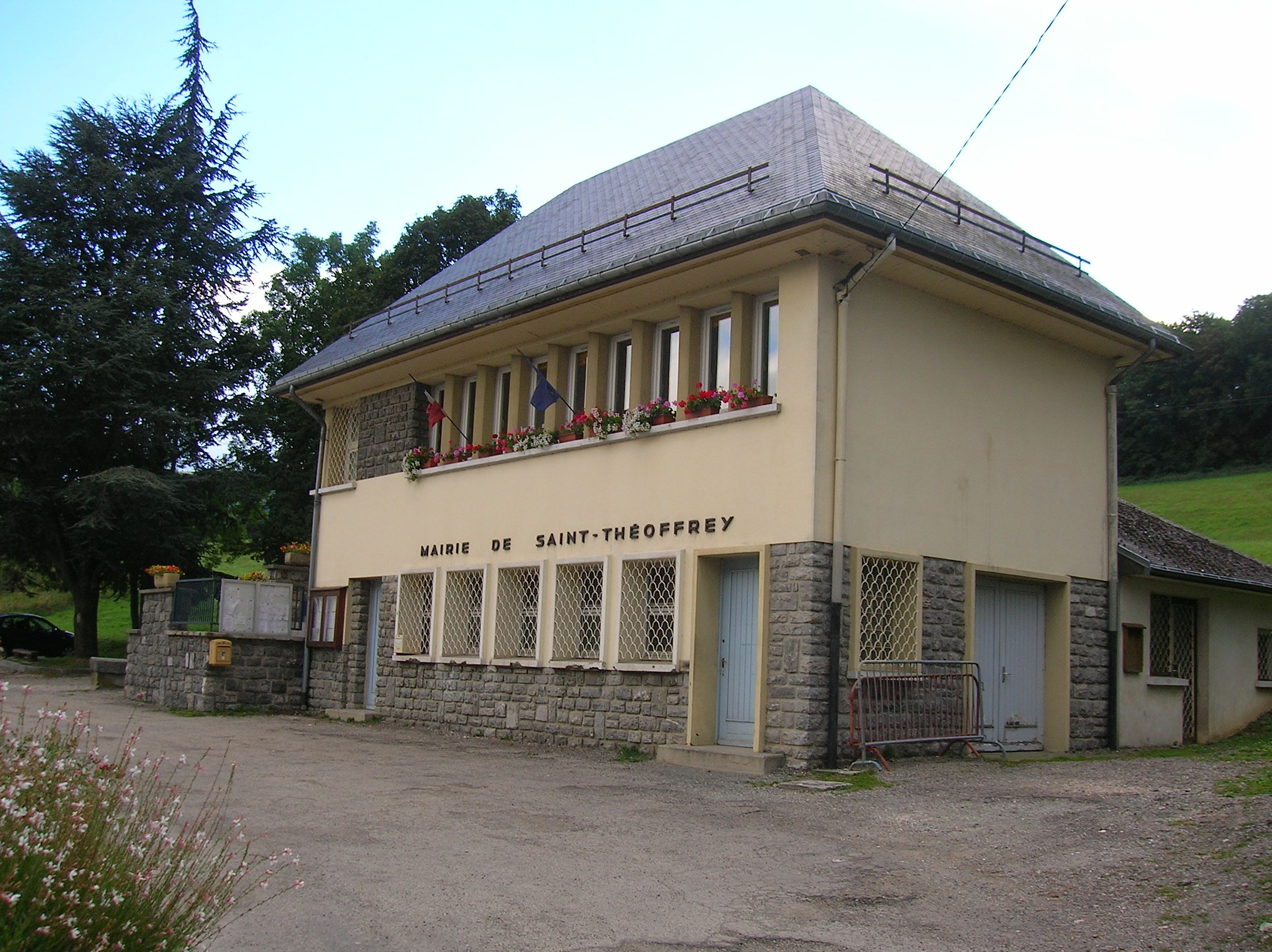 mairie de Saint-Théoffrey, Isère, Rhône-Alpes, France.